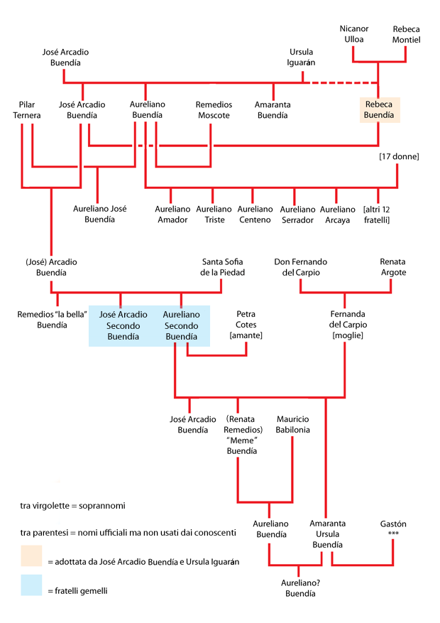 Albero genealogico della famiglia Buendìa dal romanzo "Cent'anni di solitudine" di Gabriel Garcia Marquez. Schema grafico realizzato personalmente pubblico dominio.